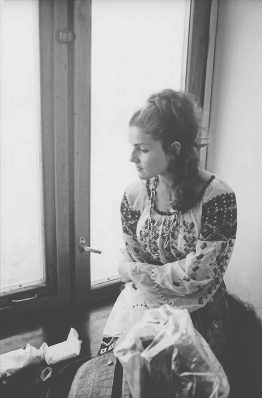 Nadejda Cepraga - Moldavian soviet singer (70-ies).